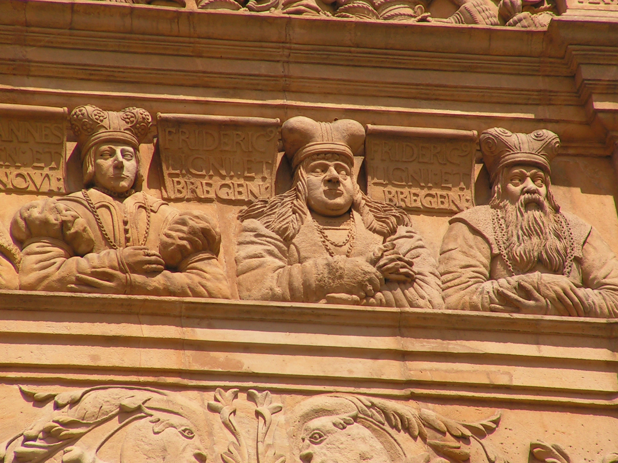 Zamek w Brzegu. Frament portalu